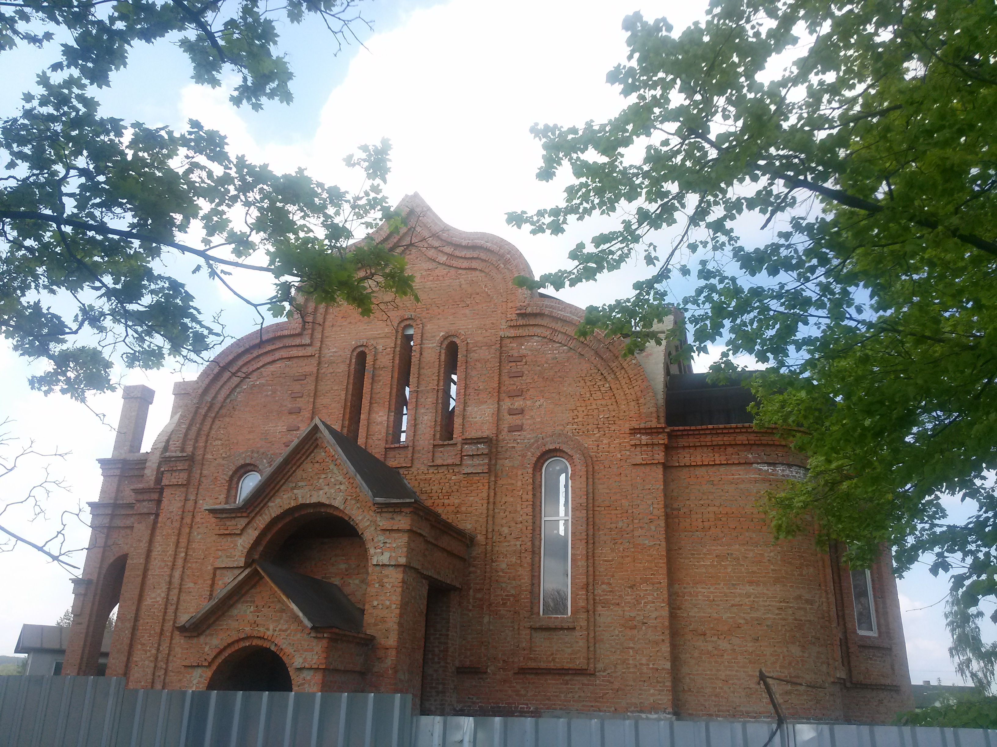 Храм Святих Мучениць Віри, Надії, Любові та матері їх Софії, смт Старий Салтів (недобудована церква, вид спереду)